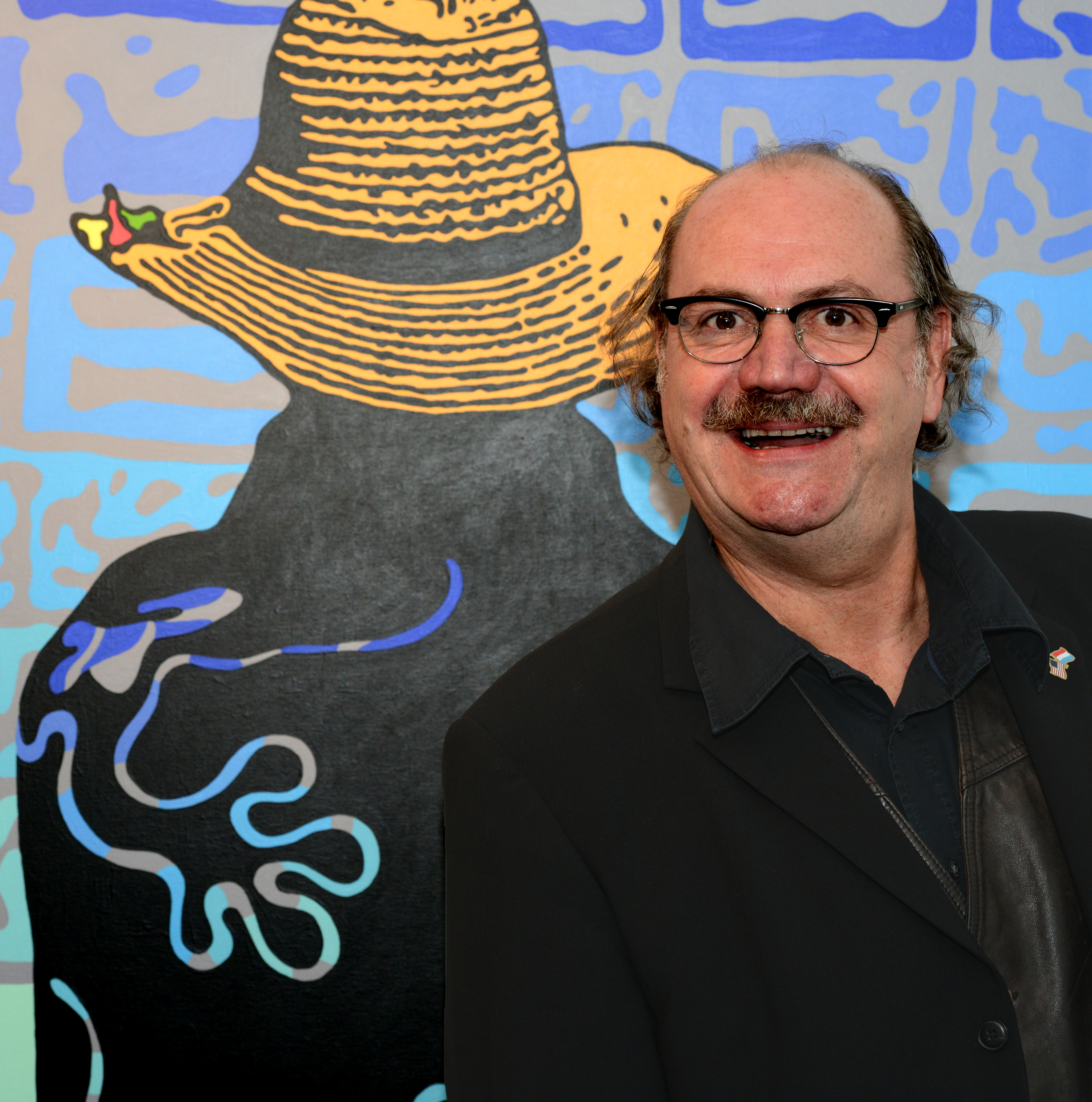 Den Armand Strainchamps vrun engem vu senge Wierker. (Perséinlech Ausstellung, Espace mediArt, Mee 2014).